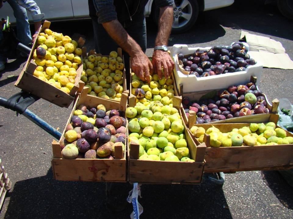 Venta de Higo ambulante en Alhucemas